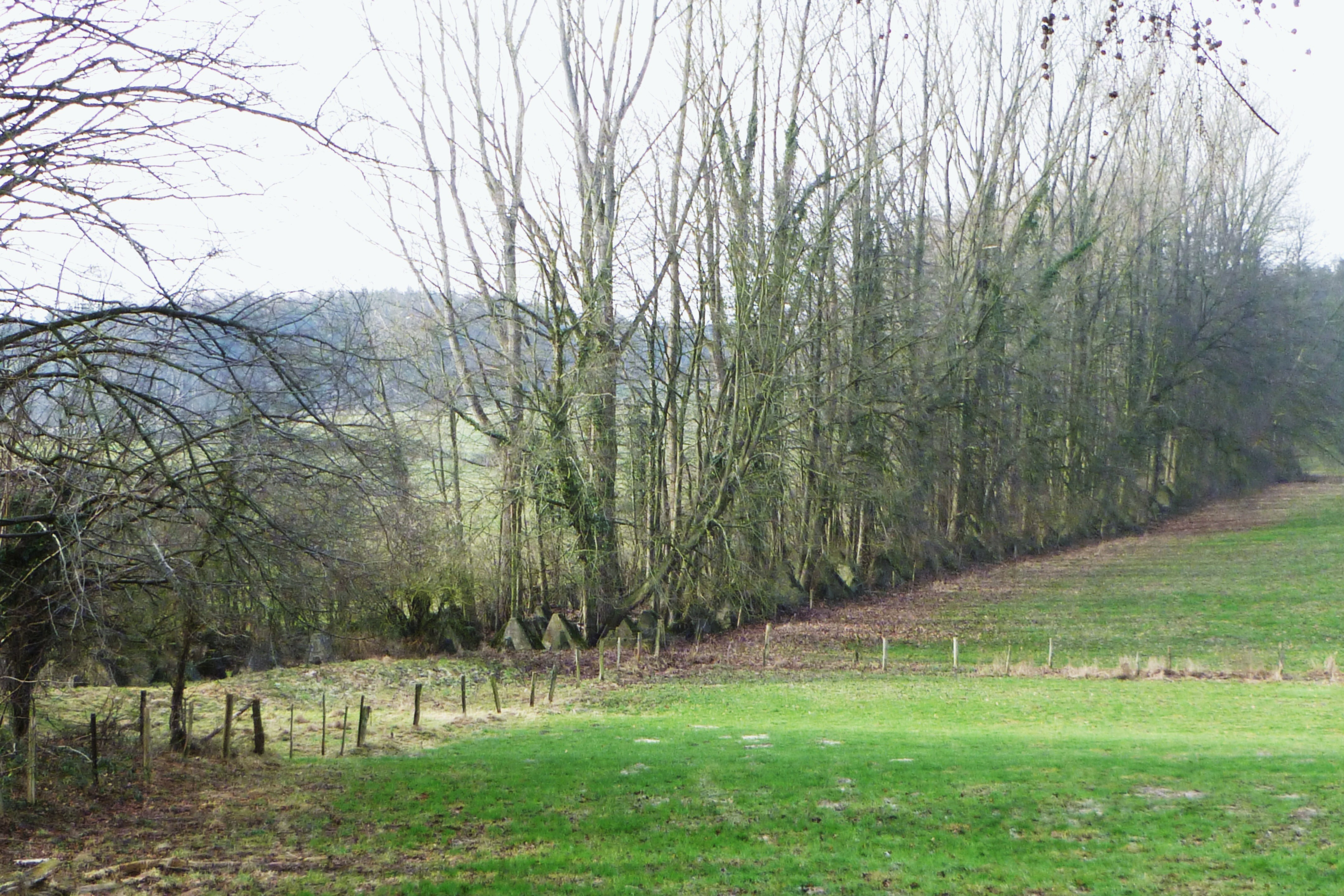 Baudenkmal in Aachen-Mitte